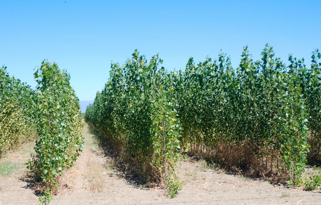 Chopos para biomasa (Saucedilla)